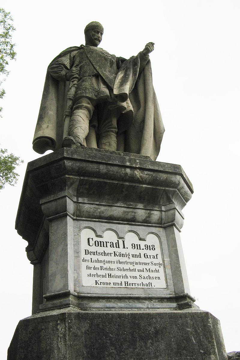 König-Konrad-Denkmal in Villmar (errichtet 1894)